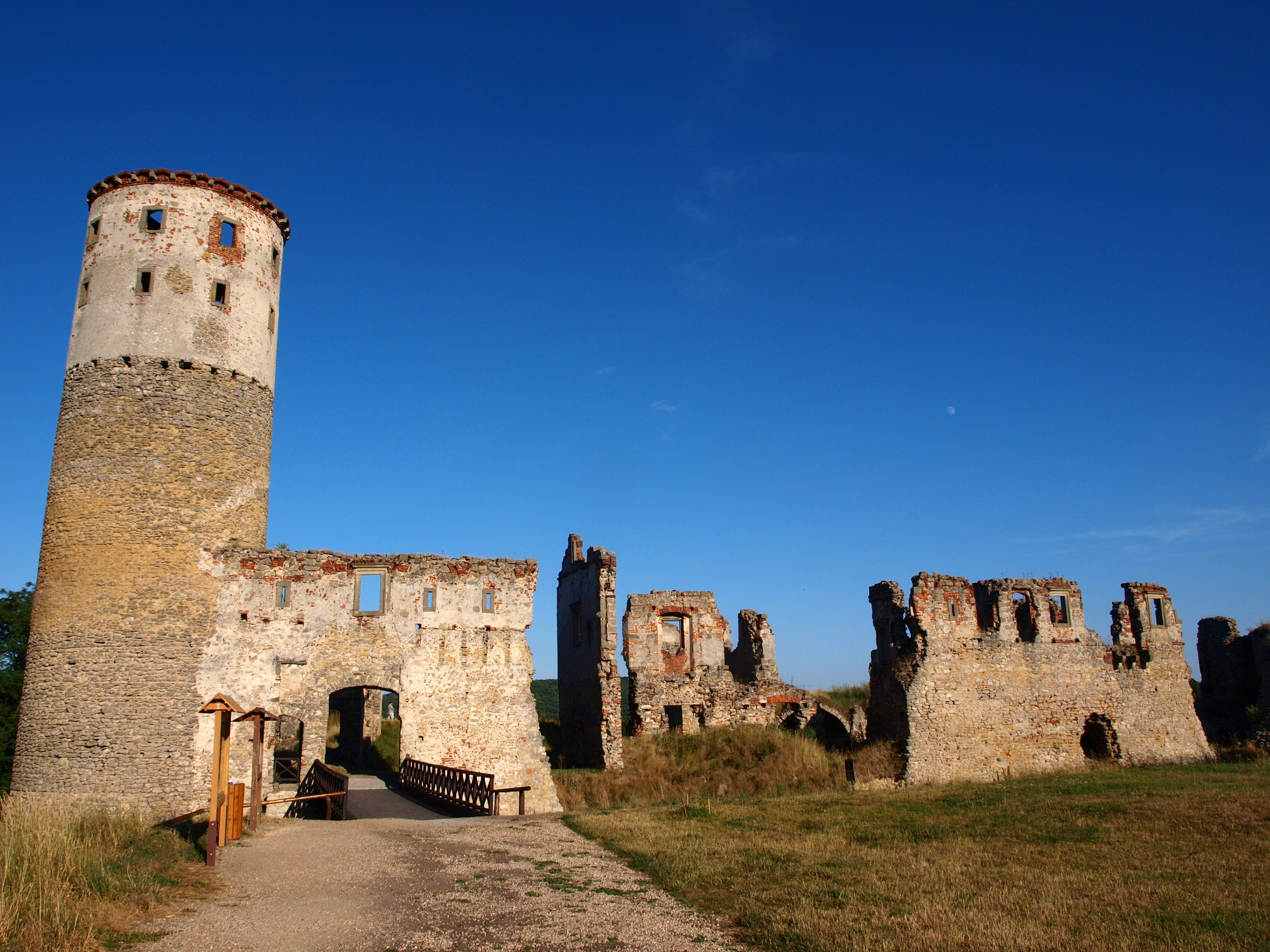 Zřícenina hradu Zvířetice